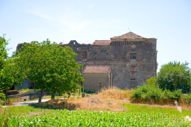 Palazzo Federico II, noto anche come Casino del Principe, a Calvi (BN)